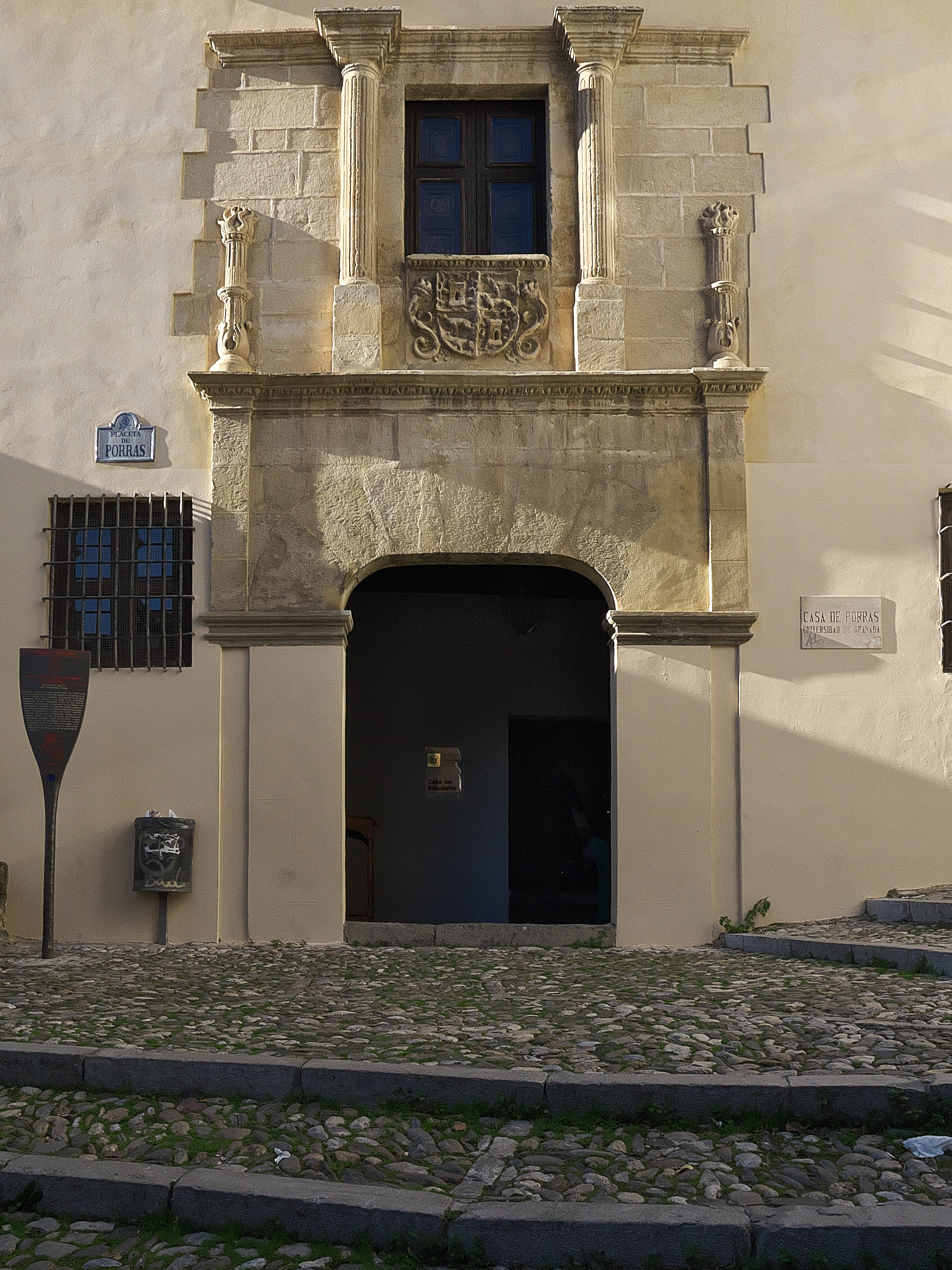 La casa (s. XVI) perteneció a Alonso de Porras, jurado del Cabildo granadino.